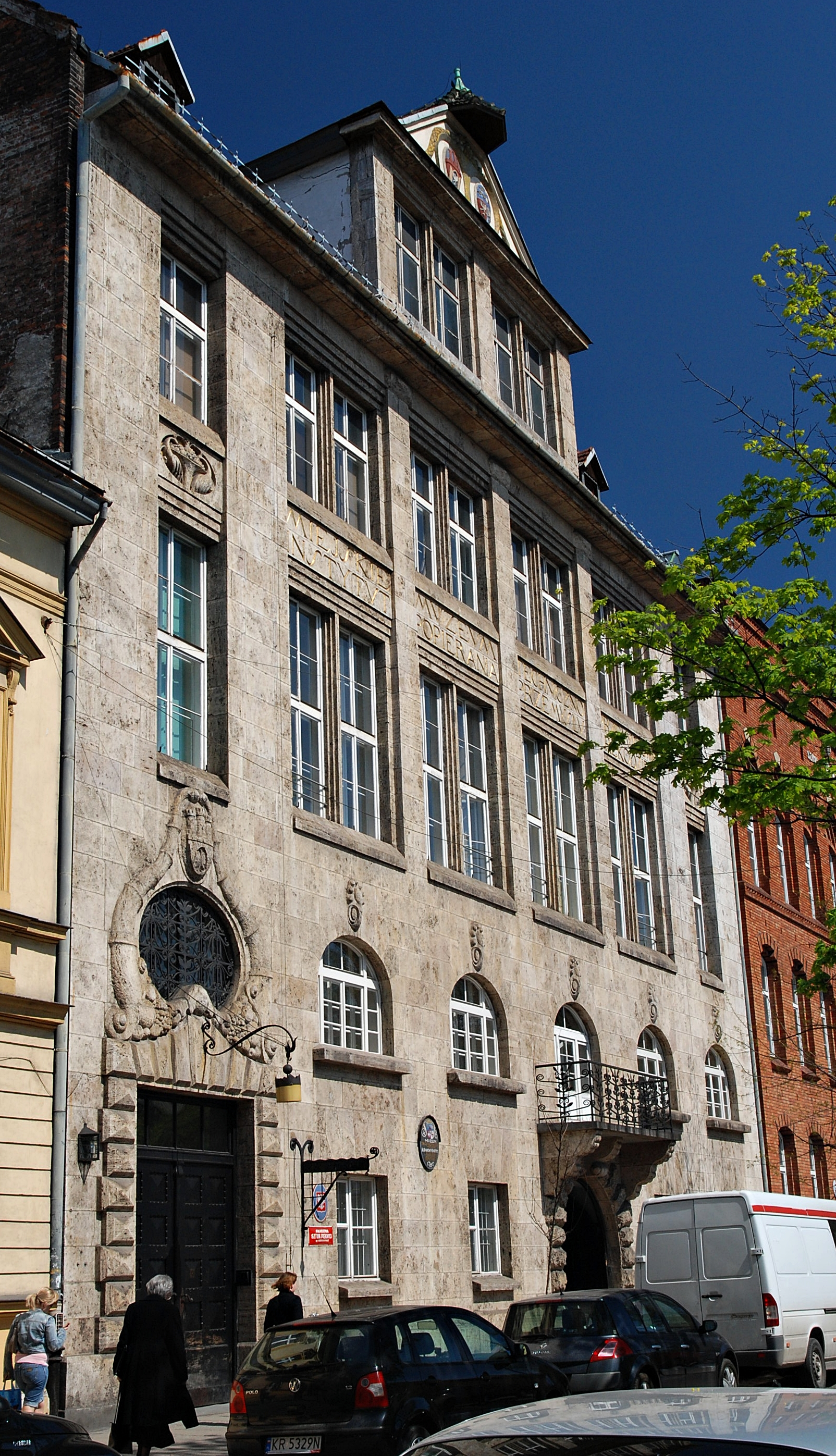 Dawne Muzeum Techniczno-Przemysłowe, obecnie budynek Akademii Sztuk Pięknych. Ul. Smoleńsk, KrakówArchitekci: Tadeusz Stryjeński i Franciszek Mączyński. Autor rzeźb: Józef Czajkowski. 1908-1914